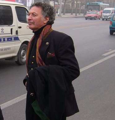 Alessandro Kokocinski